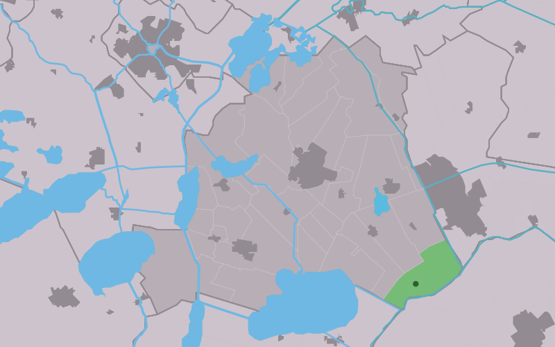 Kaartsje fan himrik fan Rotstergaast